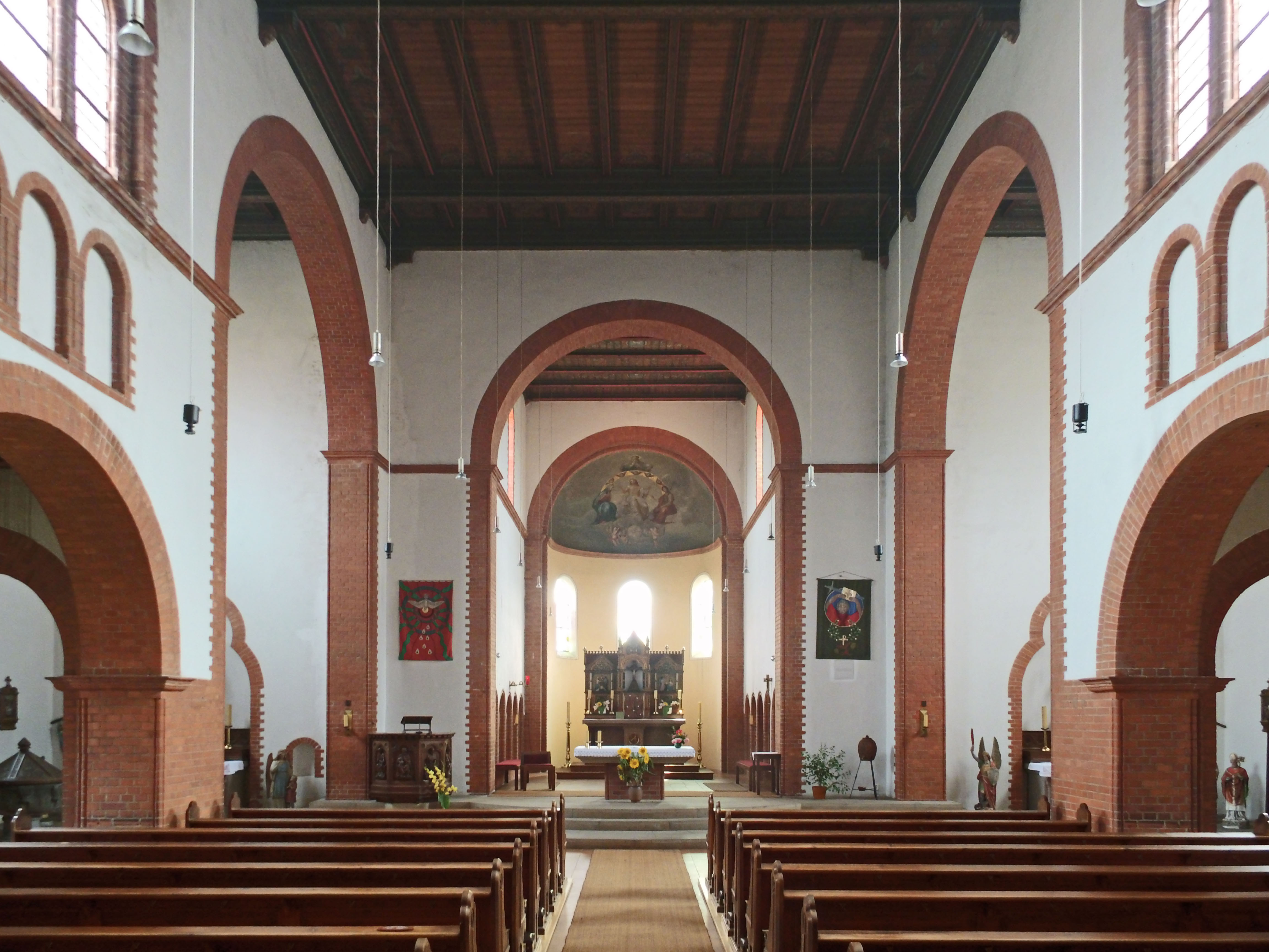 Katholische Kirche St. Joseph und Augustinus in Hötensleben